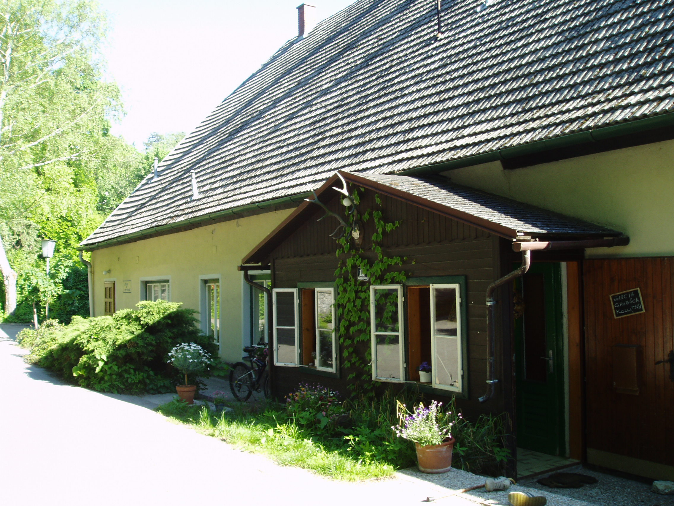 Altes Waldamt in Alland